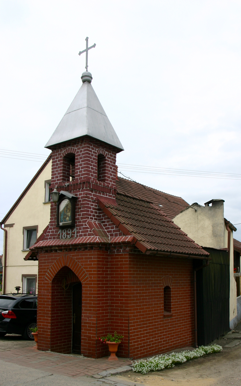 Ściborowice — wieś w Polsce położona w województwie opolskim, w powiecie krapkowickim, w gminie Krapkowice. Object location50° 25′ 28″ N, 17° 55′ 29″ E